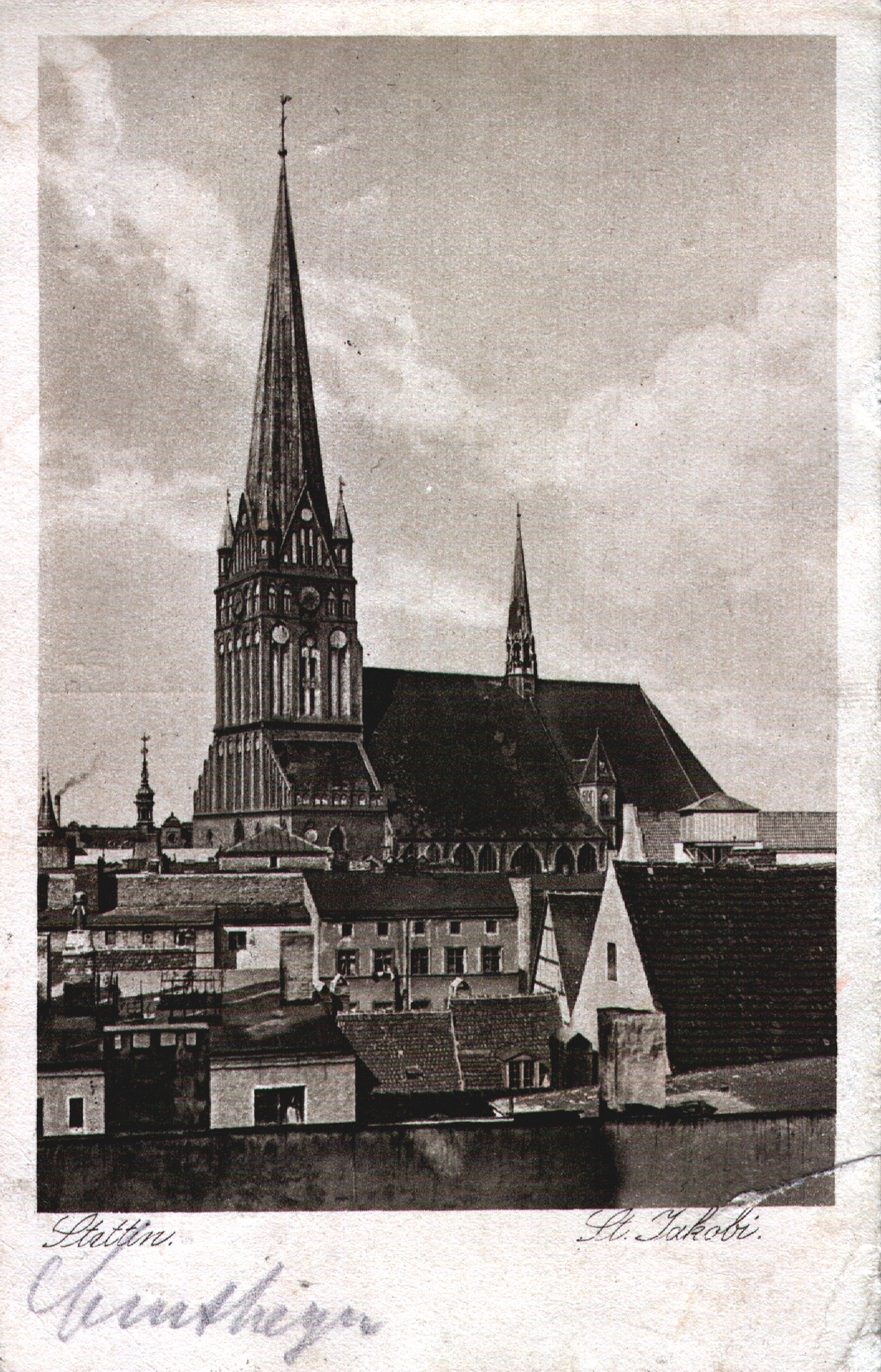 Szczecin na starej fotografii